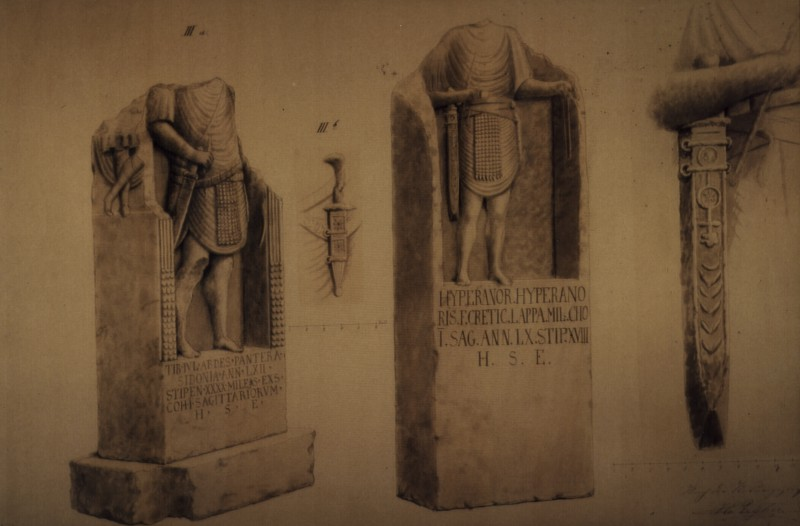 Zeichnung von zwei röm. Grabsteinen von Soldaten der I. Kohorte der Bogenschützen (Cohors I Sagittariorum), die 1859 bei Eisenbahnbauarbeiten bei Bingerbrück gefunden wurden